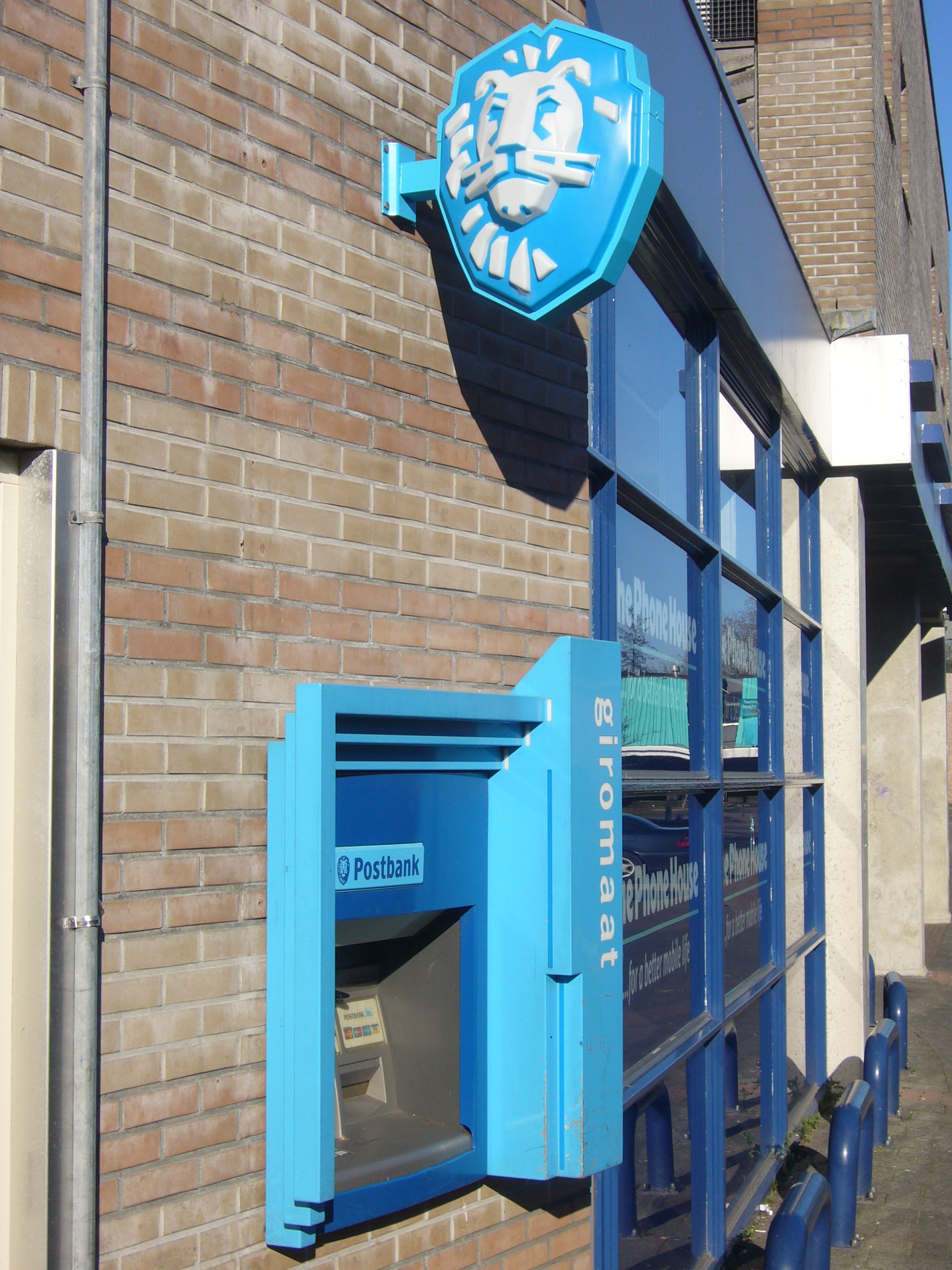 Postbank automaat Sneek, 2008